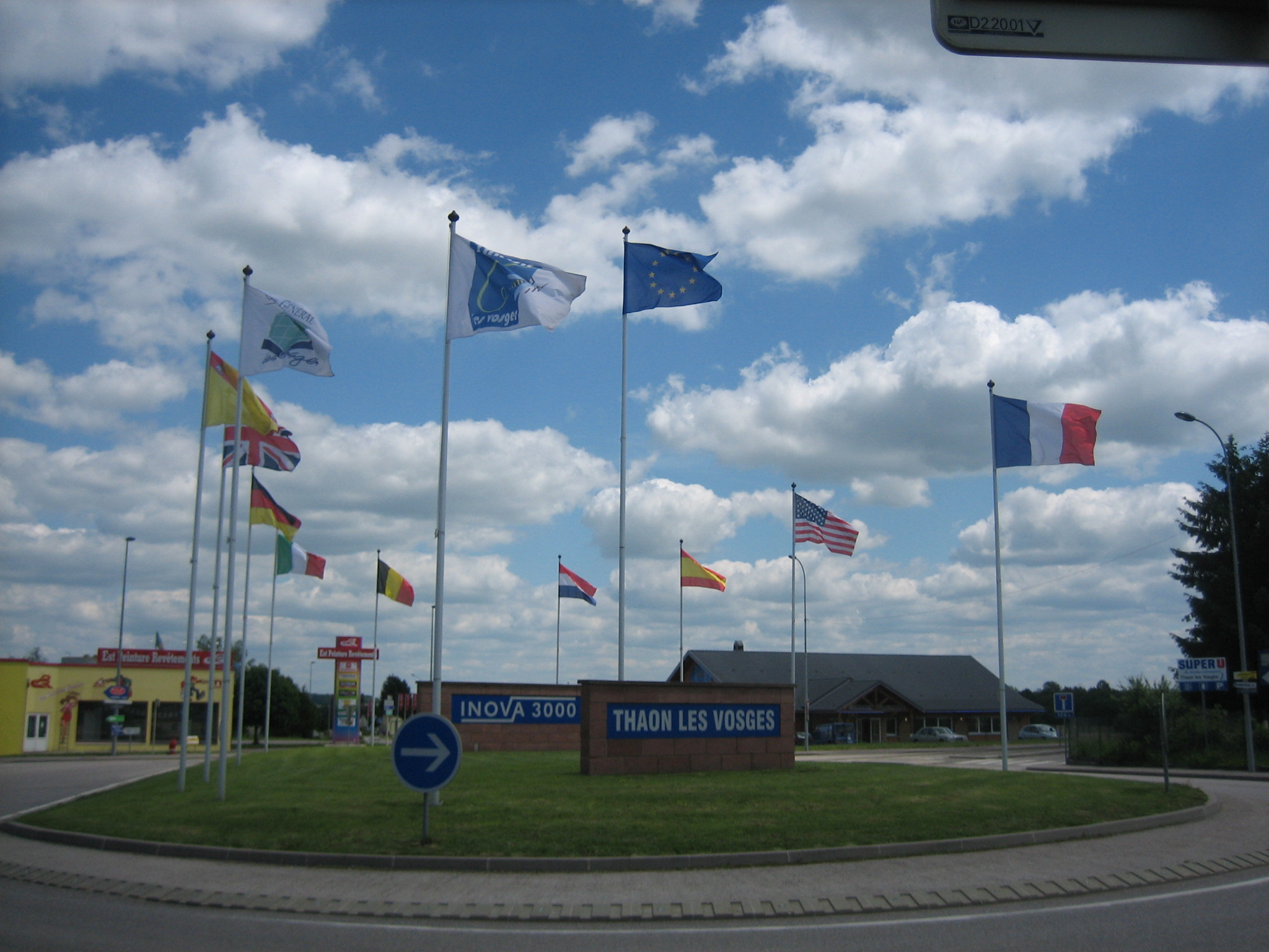 Entrée de la zone industrielle Innova3000 à Thaon-les-Vosges